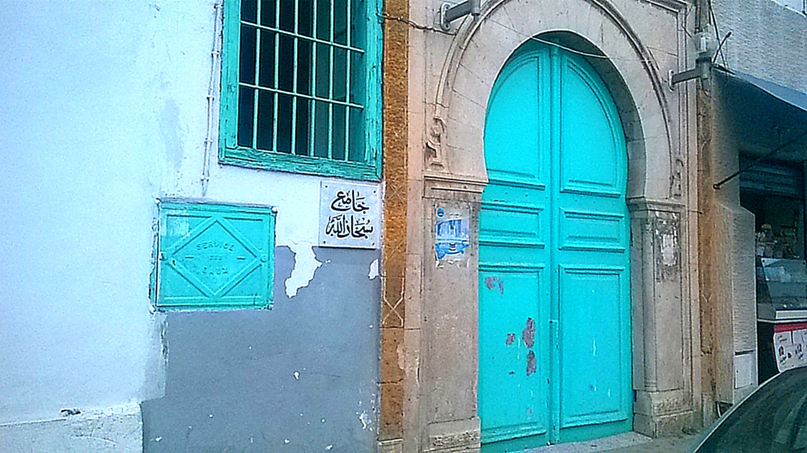 Bab Souika , Tunis باب سويقة ، تونس